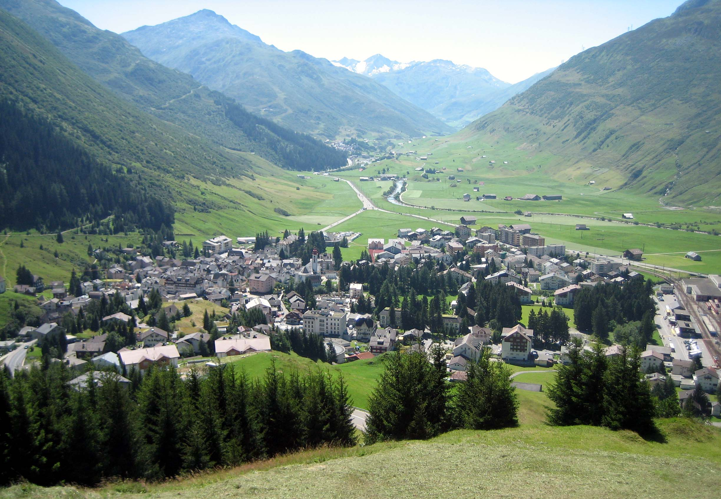 Andermatt von der Oberalppassstrasse her. Blick nach Westen in Richtung Hospental. Südlich darüber der Pizzo d'Orsino (2660 m), darunter der Hochstock (2262 m), weit im Westen Chli Muttenhorn (3024 m) und Gross Muttenhorn (3099 m), davor die Stotzigen Firsten (2759 m) südlich des Furkapasses.